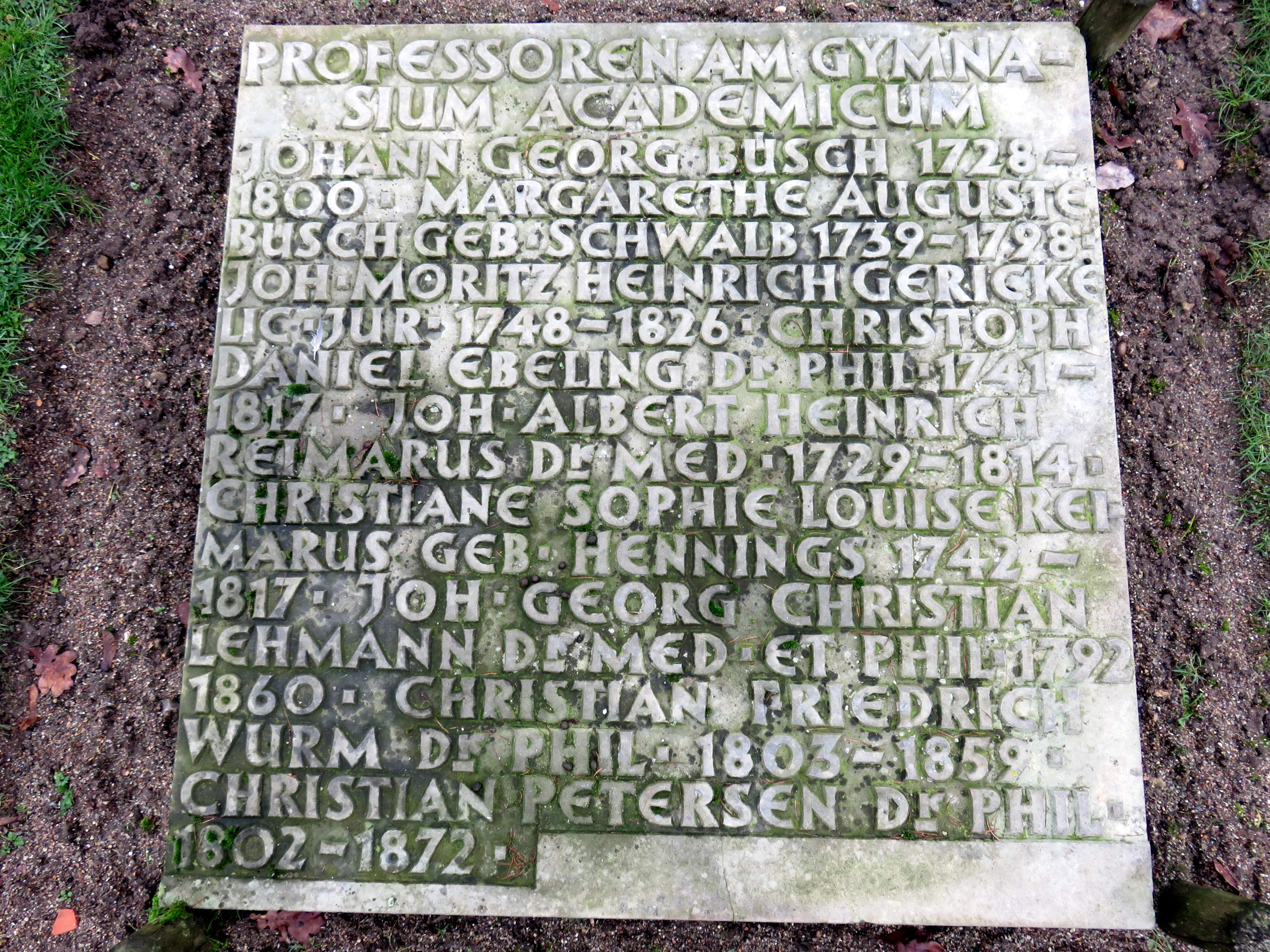 Sammelgrabmal Professoren am Gymnasium Academicum im Bereich des Althamburgischen Gedächtnisfriedhofs auf dem Hamburger Friedhof Ohlsdorf, südöstliche Rasenfläche, zu Ehren von unter anderen Johann Georg Büsch, Christoph Daniel Ebeling, Johann Albert Heinrich Reimarus, Johann Georg Christian Lehmann, Christian Friedrich Wurm.